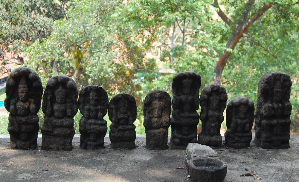 Dieties_unimportant_Kallil_temple